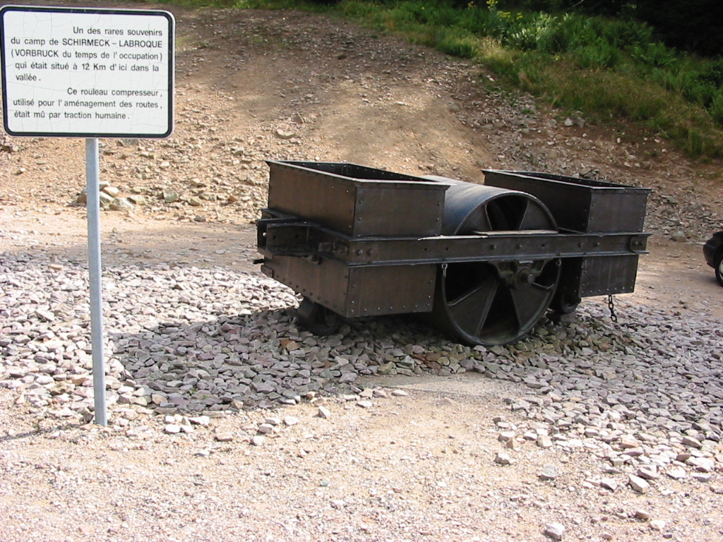 Rouleau utilisé par les prisonniers du camp de Schirmeck-La Broque. Ce rouleau est exposé près de l'entrée du Struthof.